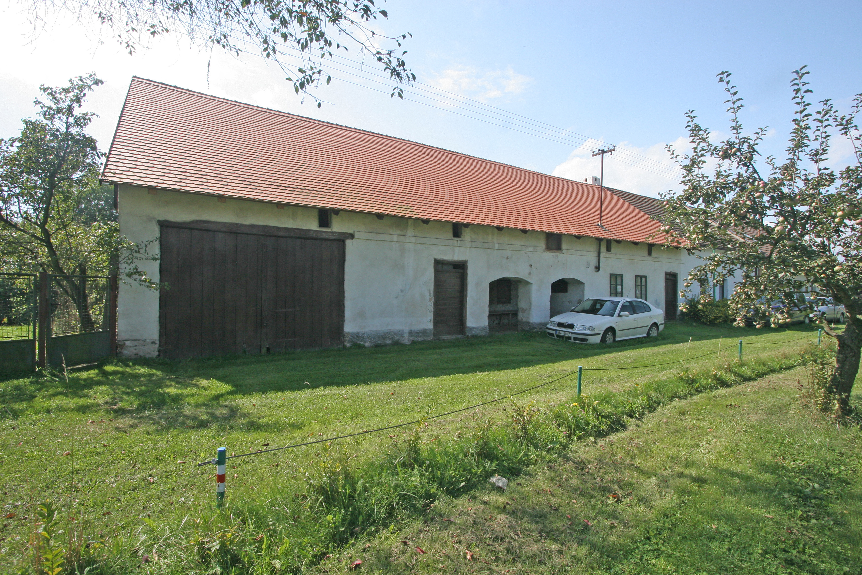 Kovárna, Labské Chrčice 46, na návsi, Labské Chrčice.